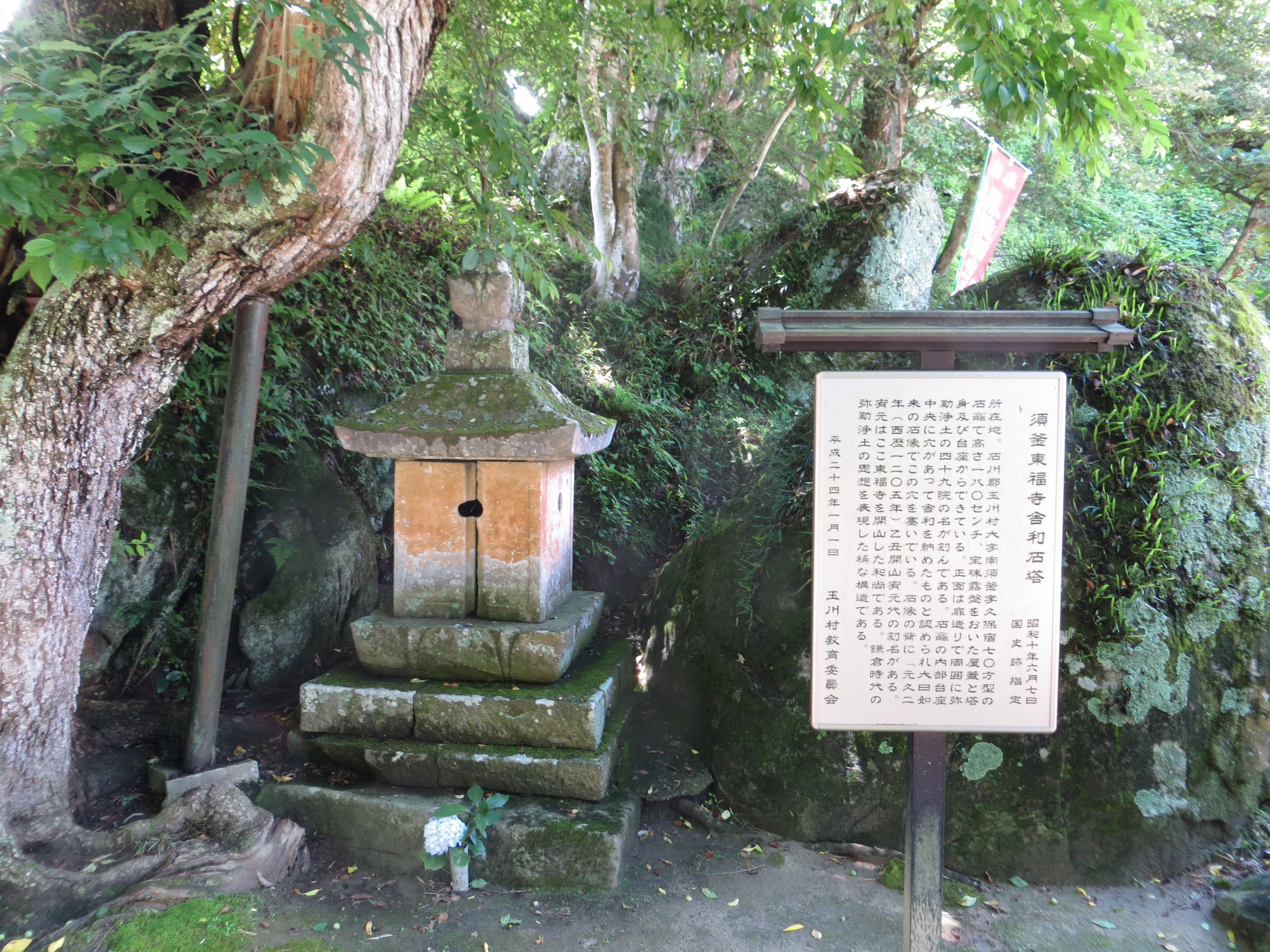 須釜東福寺舎利石塔